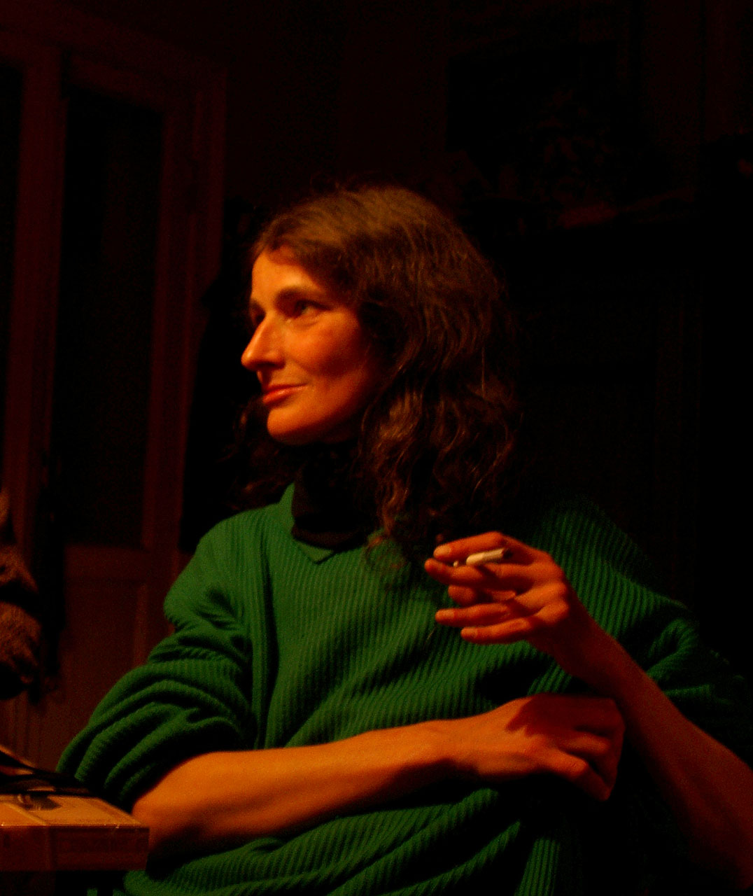 Ирина Левшакова (Линник), Комарово, 2003 год.